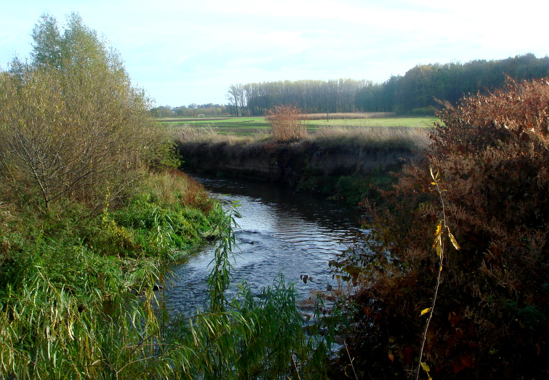 Pełcznica w Pasiecznej